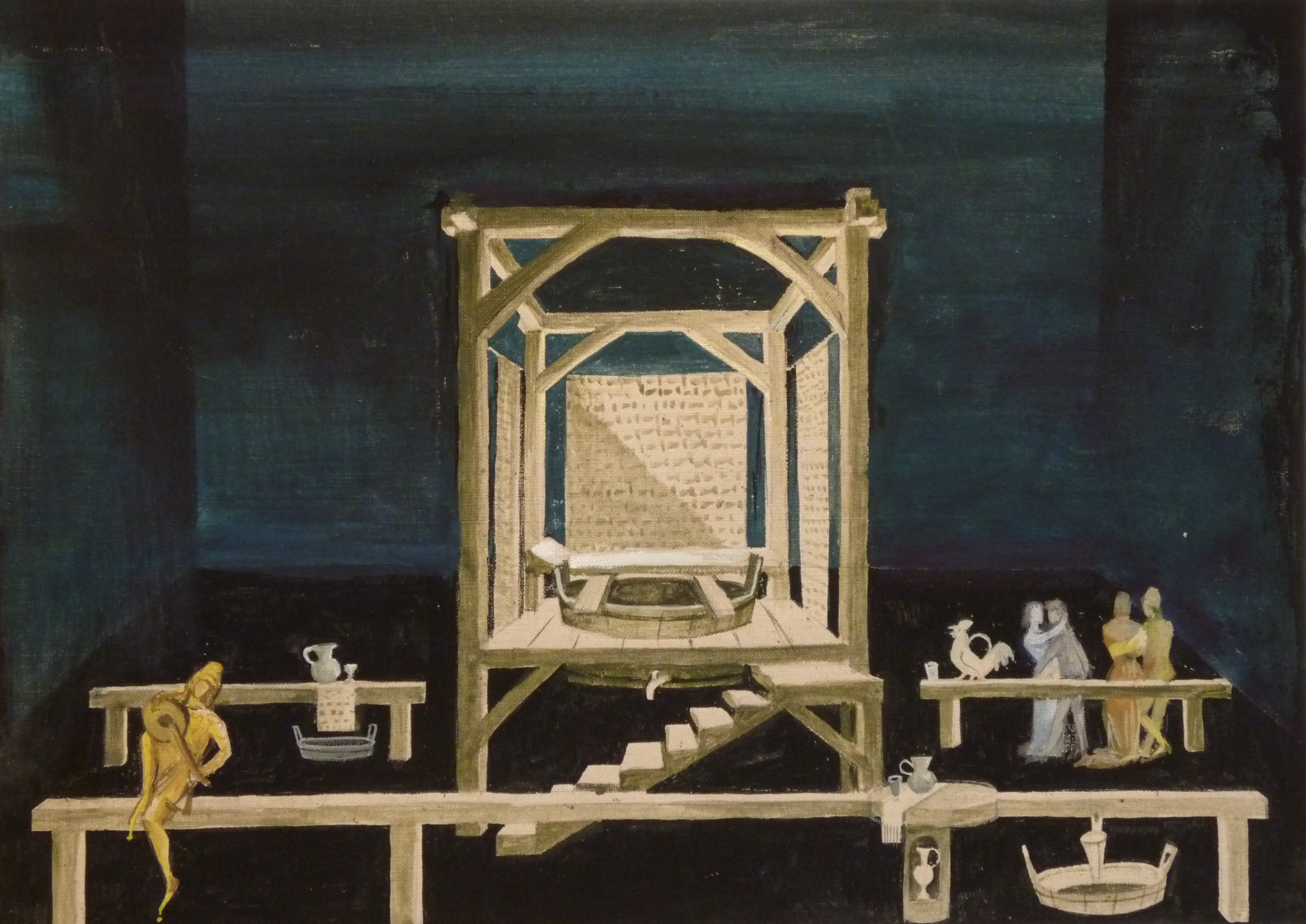 Bühnenbildentwurf von Helmut Jürgens für "Die Bernauerin" von C. Orff, Aufführung München 1954